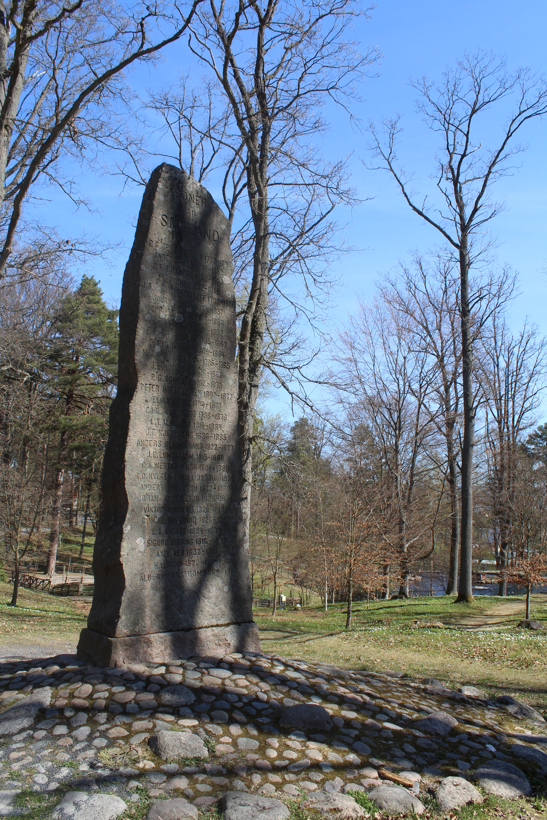 Smålandsstenen, Jönköpings stadspark